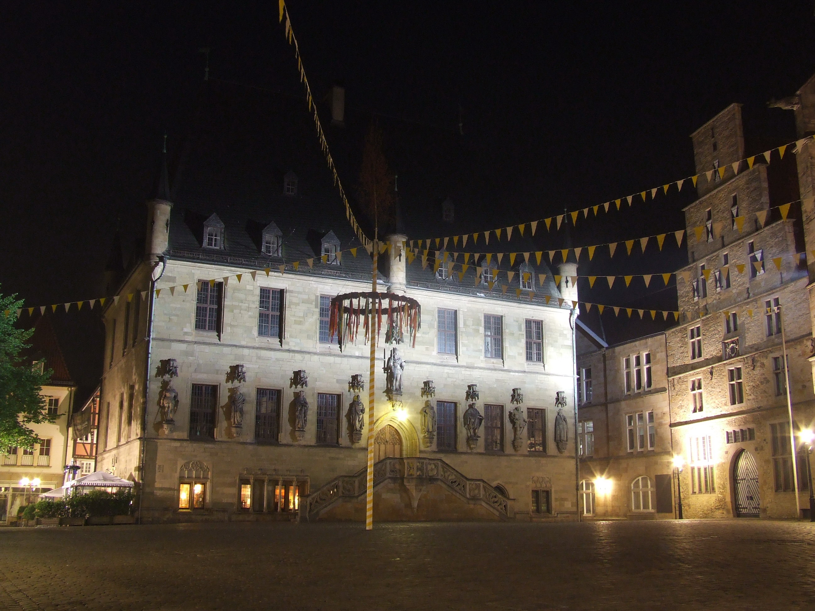 OS-Rathaus